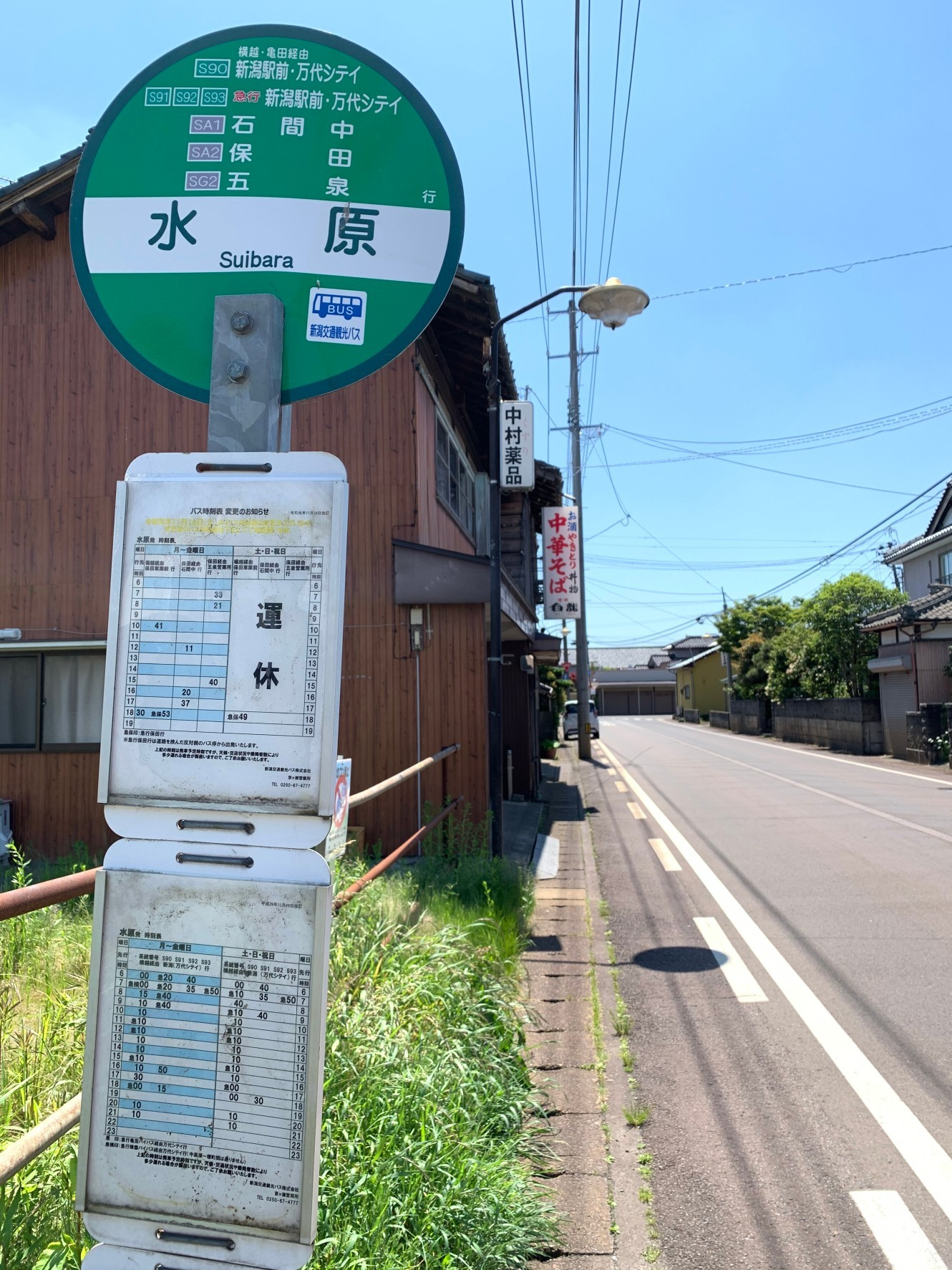 新潟交通観光バス「水原」バス停（阿賀野市，2020年5月）羽越本線水原駅東口から徒歩約3分、県道303号沿いの五頭タクシー前にある。